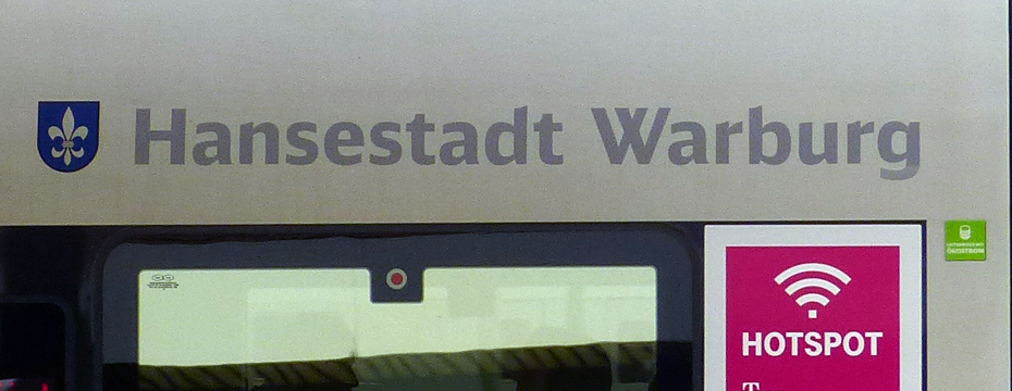 Wappen und Namenszug der Hansestadt Warburg (Nordrhein-Westfalen) am ICE-Triebwagen 411 574, aufgenommen in Nürnberg Hbf